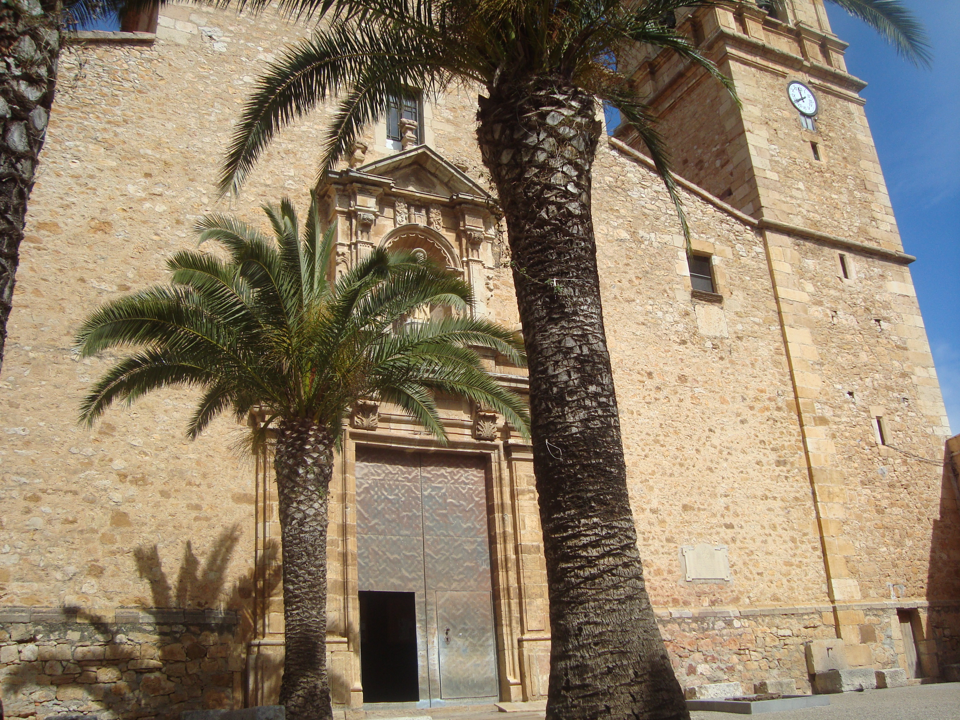 Església parroquial de Sant Bartomeu (Vilanova d'Alcolea) 05.132-002.